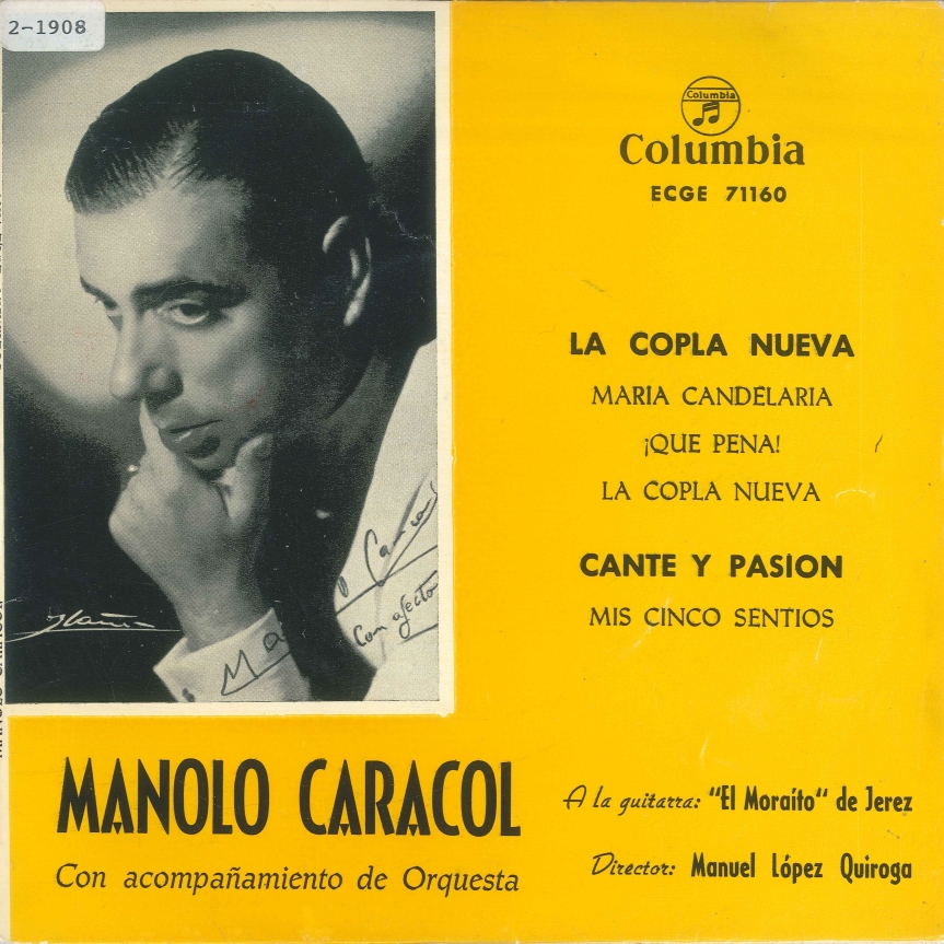 portada del single de Manolo Caracol con Manuel Morao